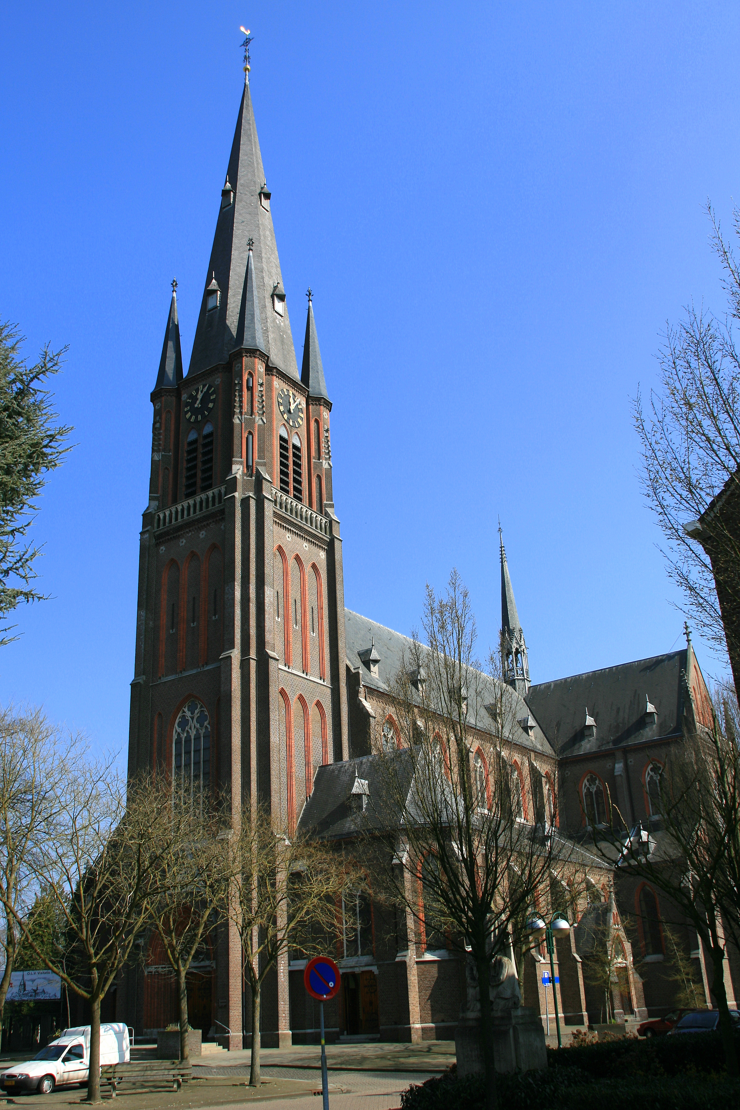 De R.K. kerk O.L. Vrouw Visitatie is een driebeukige neogotische kruisbasiliek uit 1904-'12 met hoge westtoren van vier geledingen, voorzien van naaldspits met flankerende torentjes. De rijzige kerk is naar ontwerp van C. Franssen opgetrokken in baksteen met vensteromlijstingen van lichtere, rode verblendsteen.